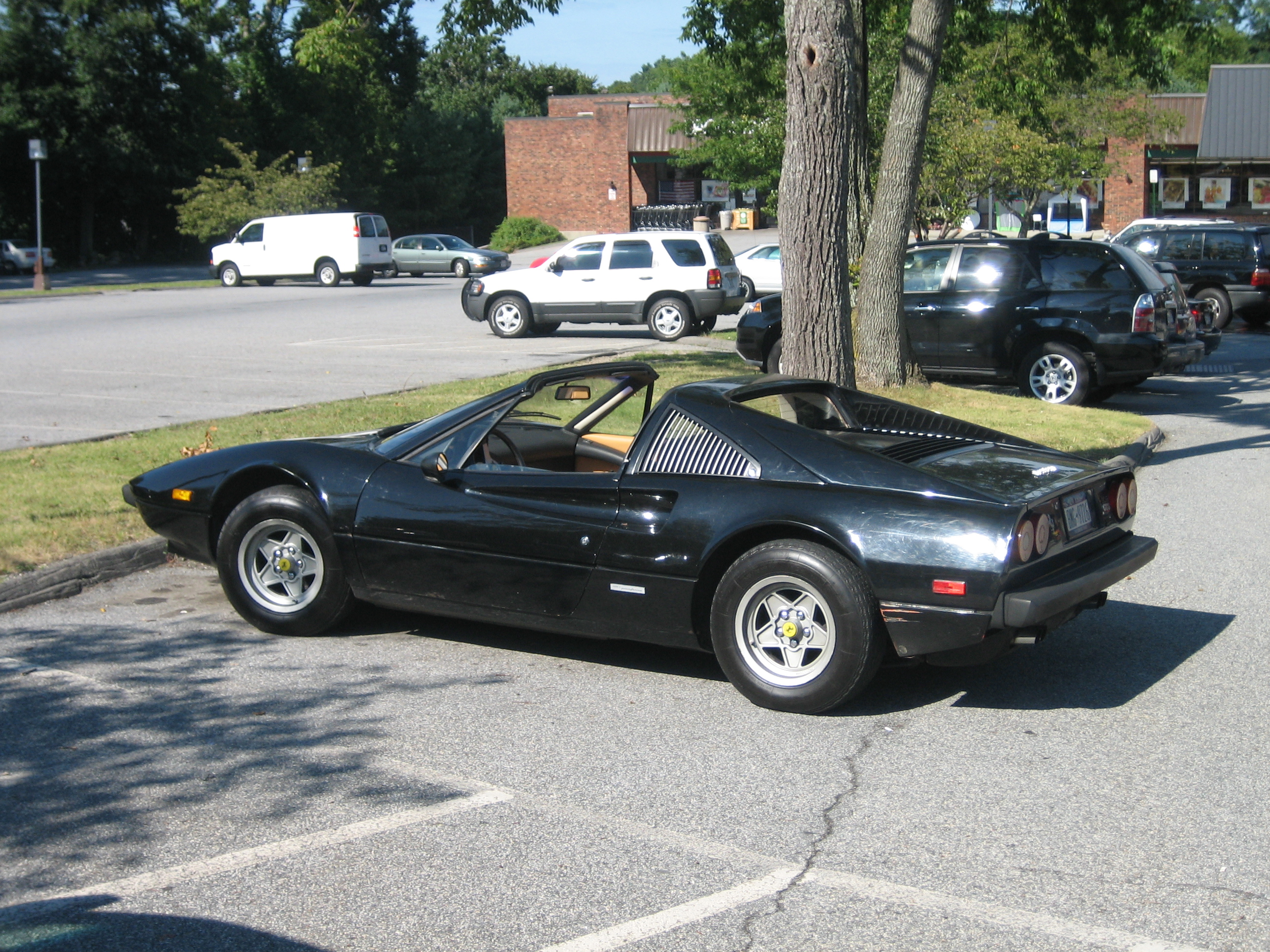 Ferrari 308 GTS